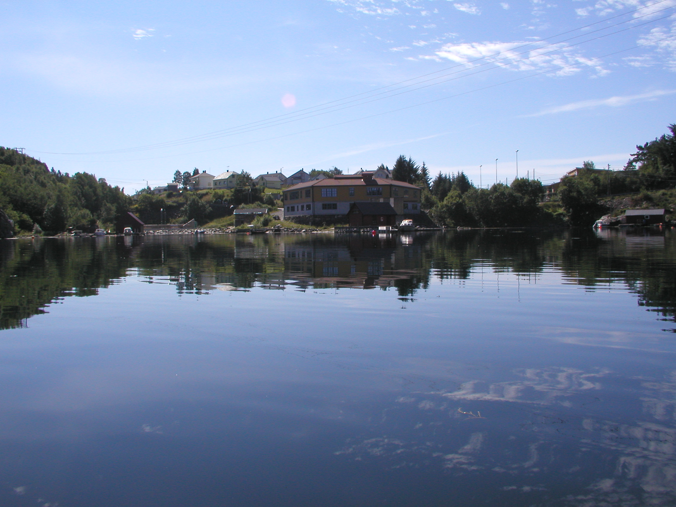 Træet Skule på Askøy.